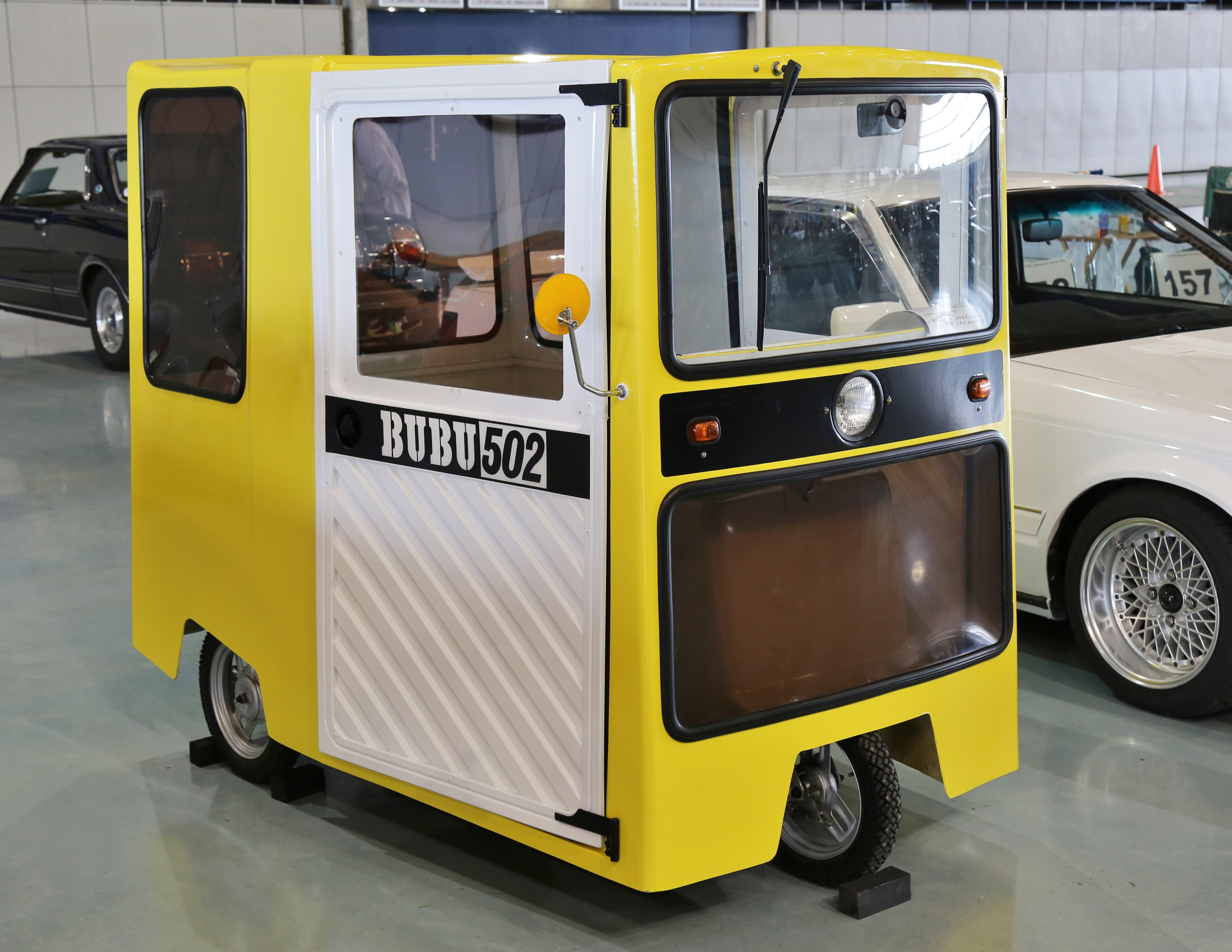 Mitsuoka AB19